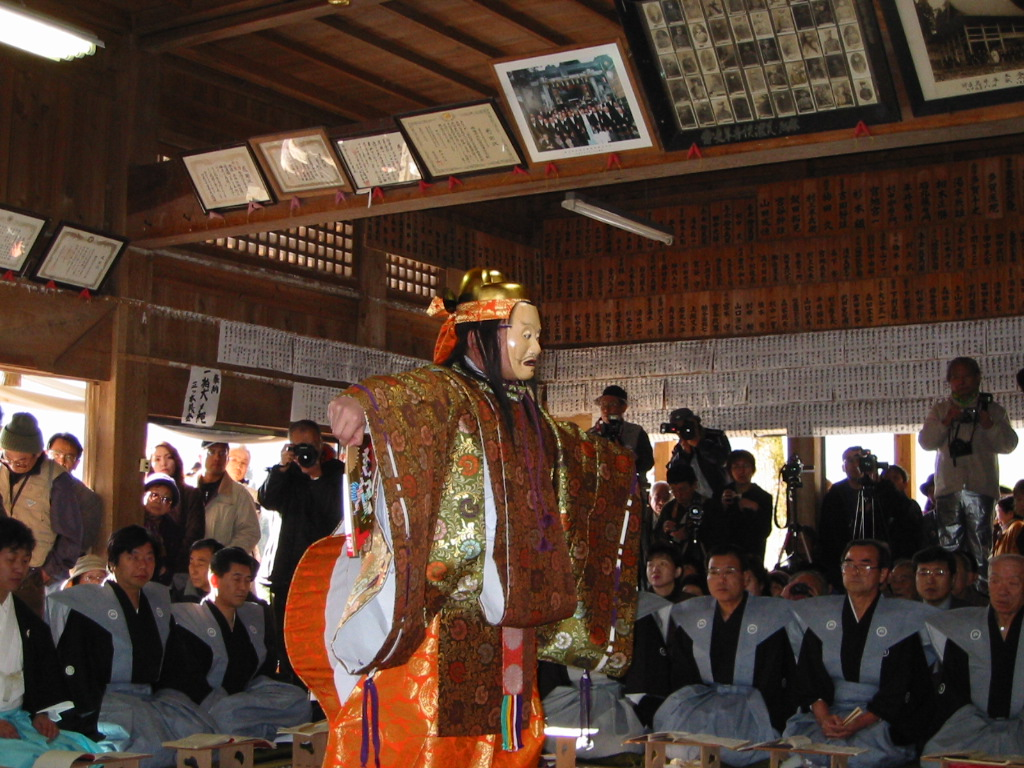 能舞「田村」